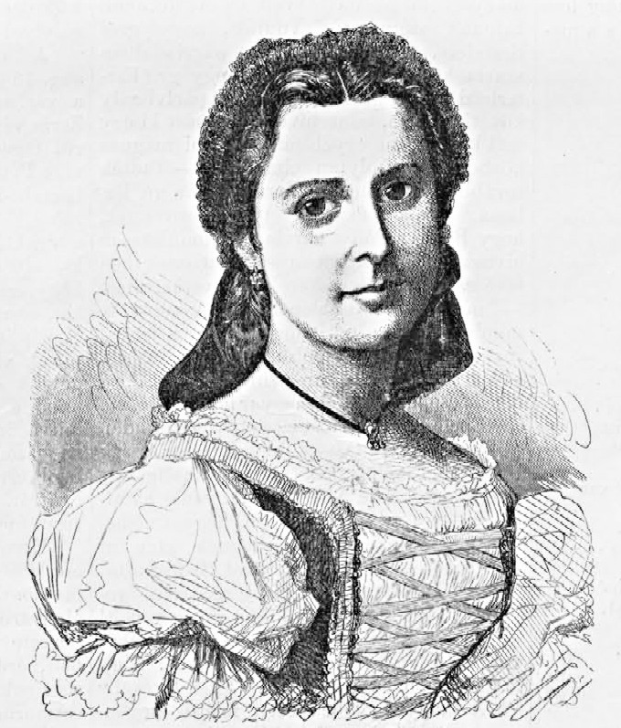 Felekyné Munkácsy Flóra (több forrásban Feleki, Munkácsi) sz.: Gaidler Emília színésznő portréja